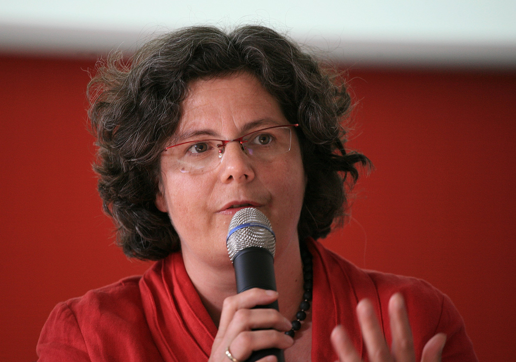 Almuth Hartwig-Tiedt, Staatssekretärin in der Senatsverwaltung für Wirtschaft, Technologie und Frauen auf der Podiumsdiskussion "Open Berlin". Foto: Michael Hörz